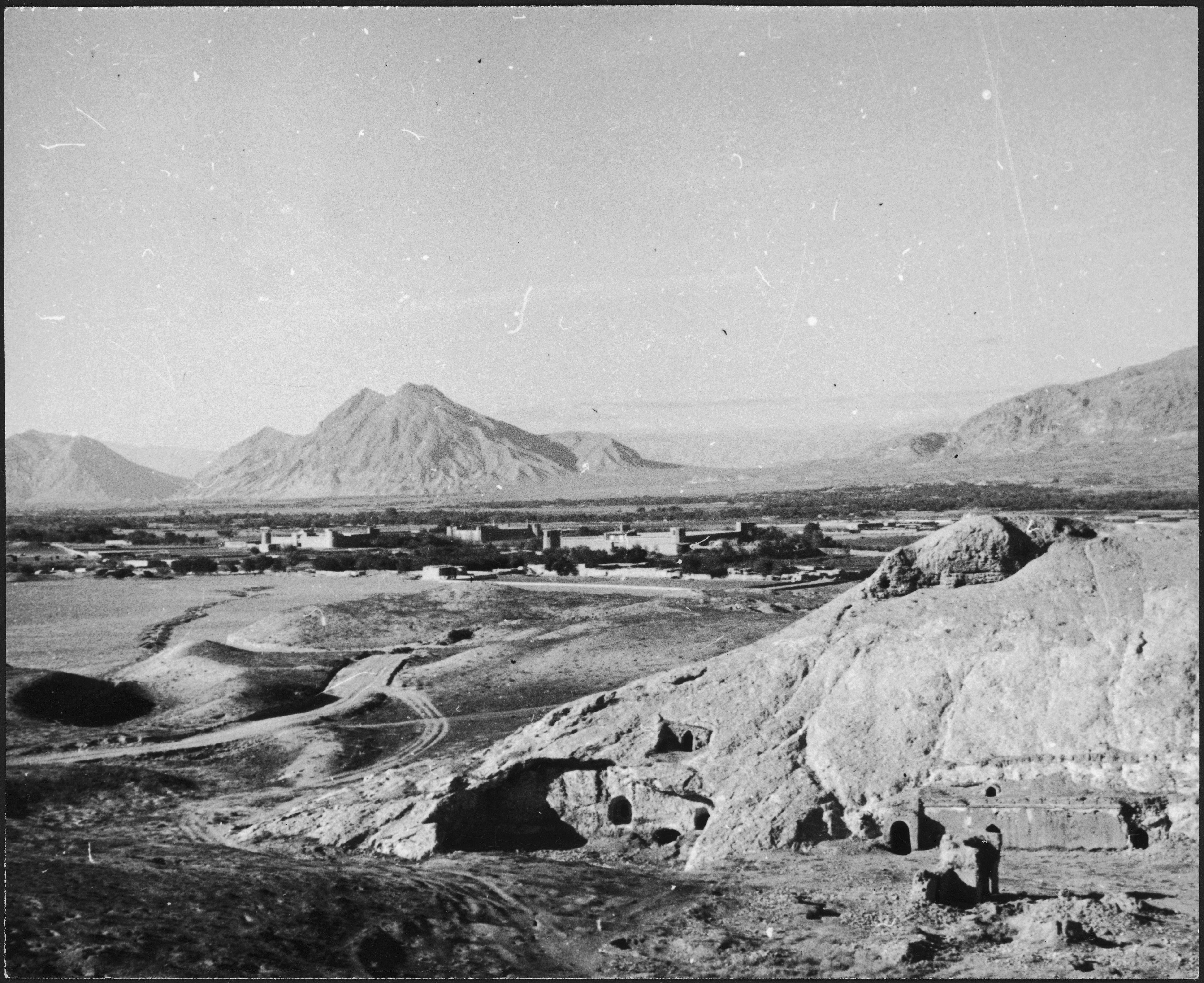 Afghanistan, Haibak (Samangan, Aybak or Aibak):; Hügel mit Höhlen